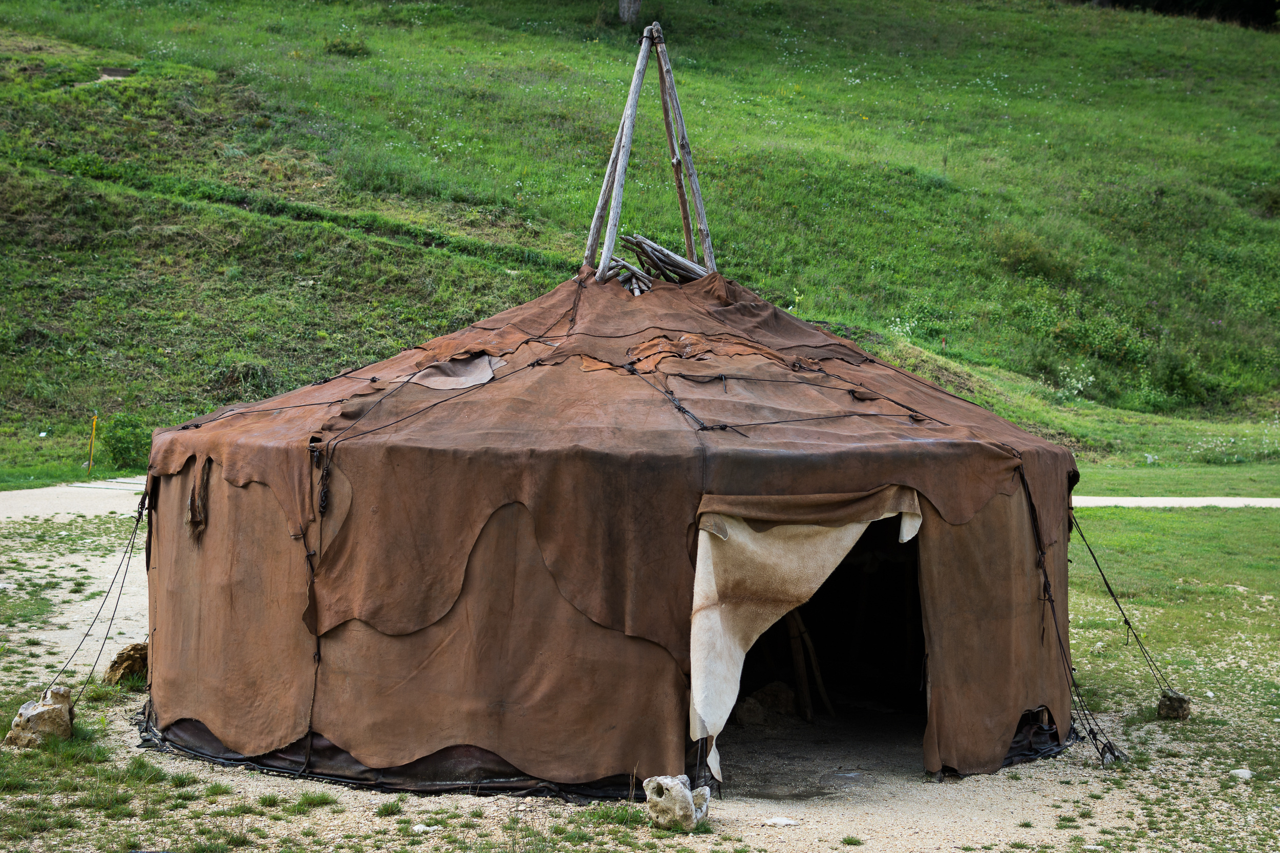 Rekonstruktion eines steinzeitlichen Zeltes im Archäopark Vogelherd. Konzeption und Ausführung durch Rudolf Walter, Schelklingen [1]